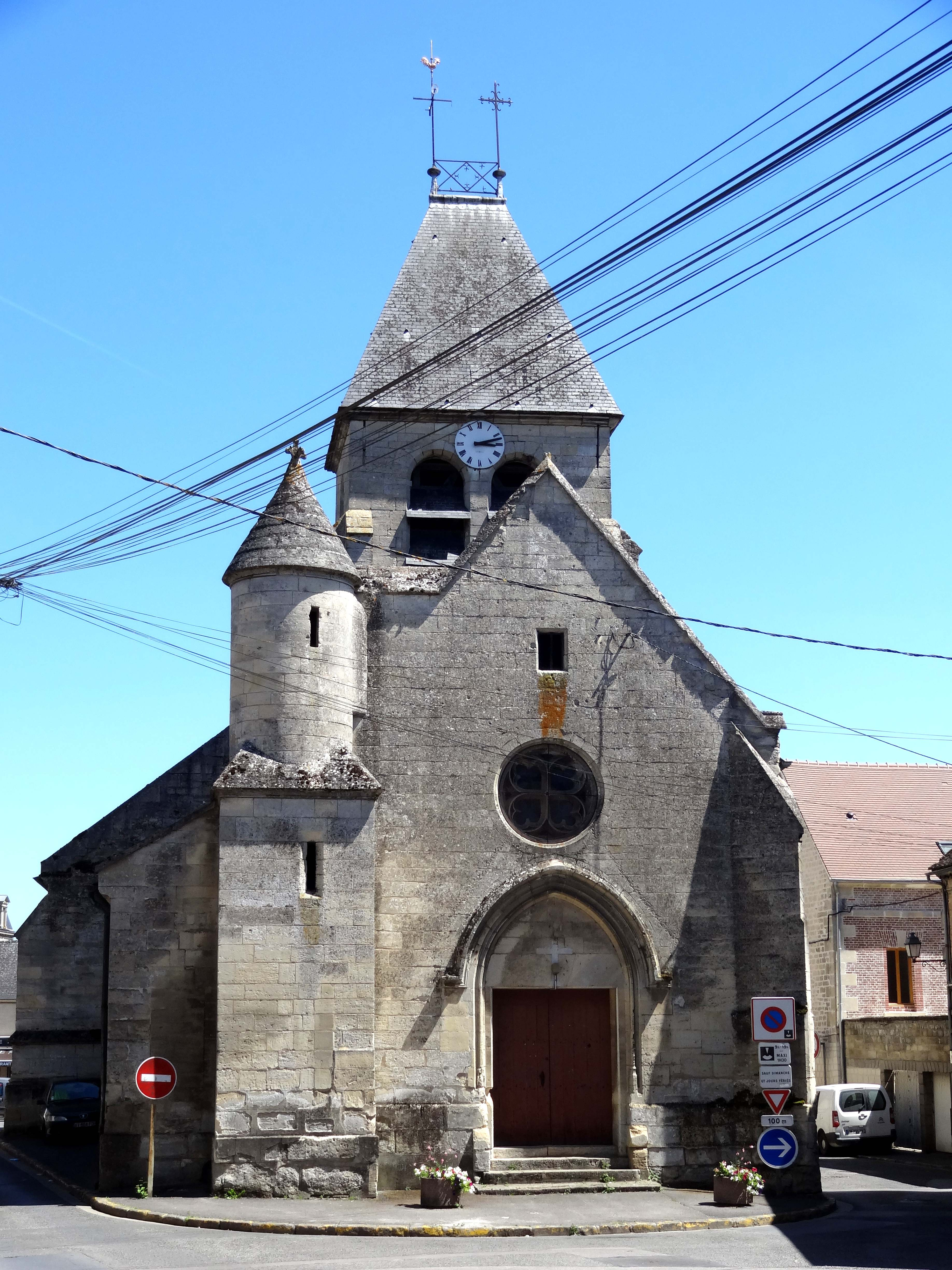 Façade occidentale.